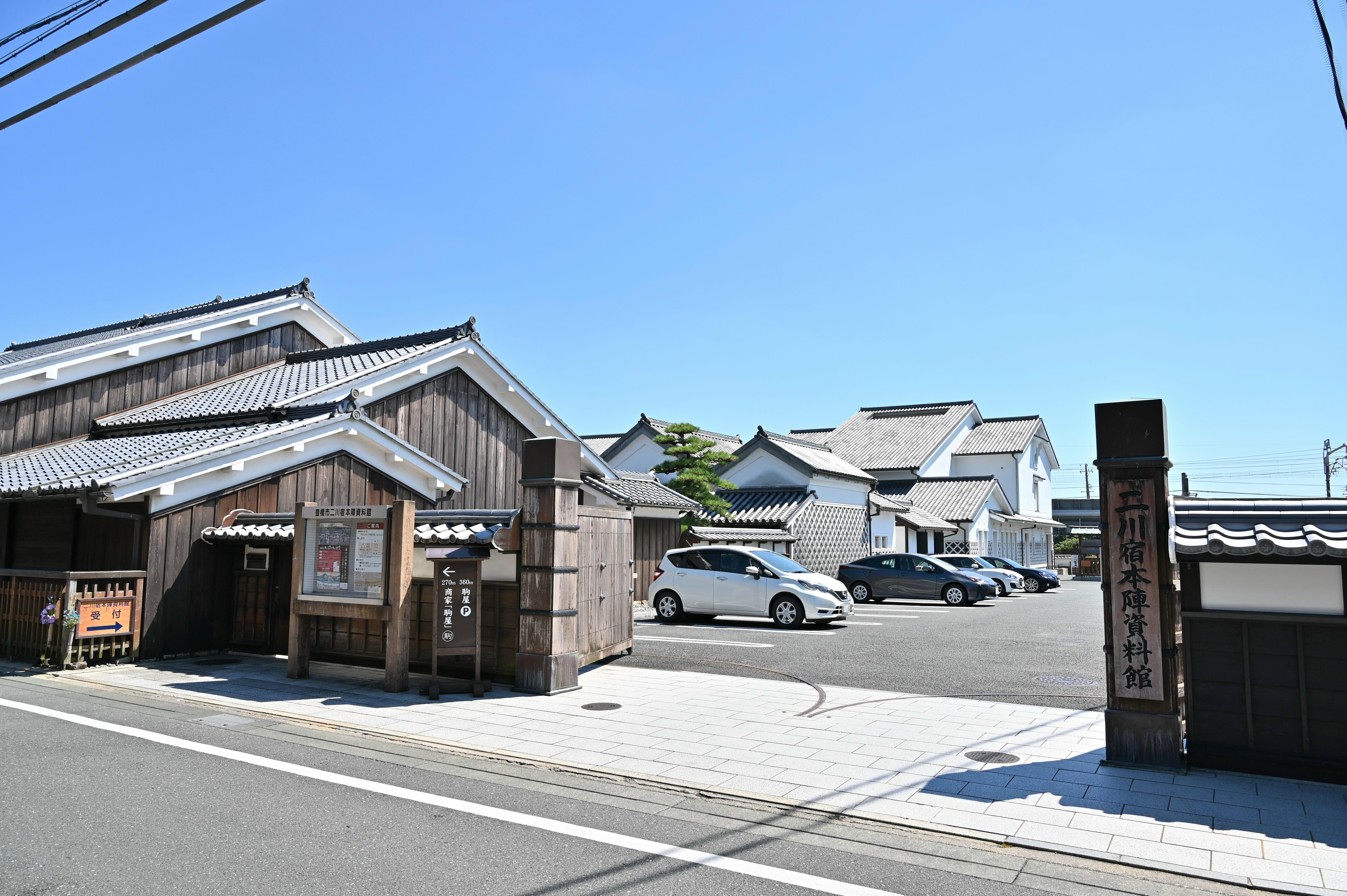 二川宿本陣資料館